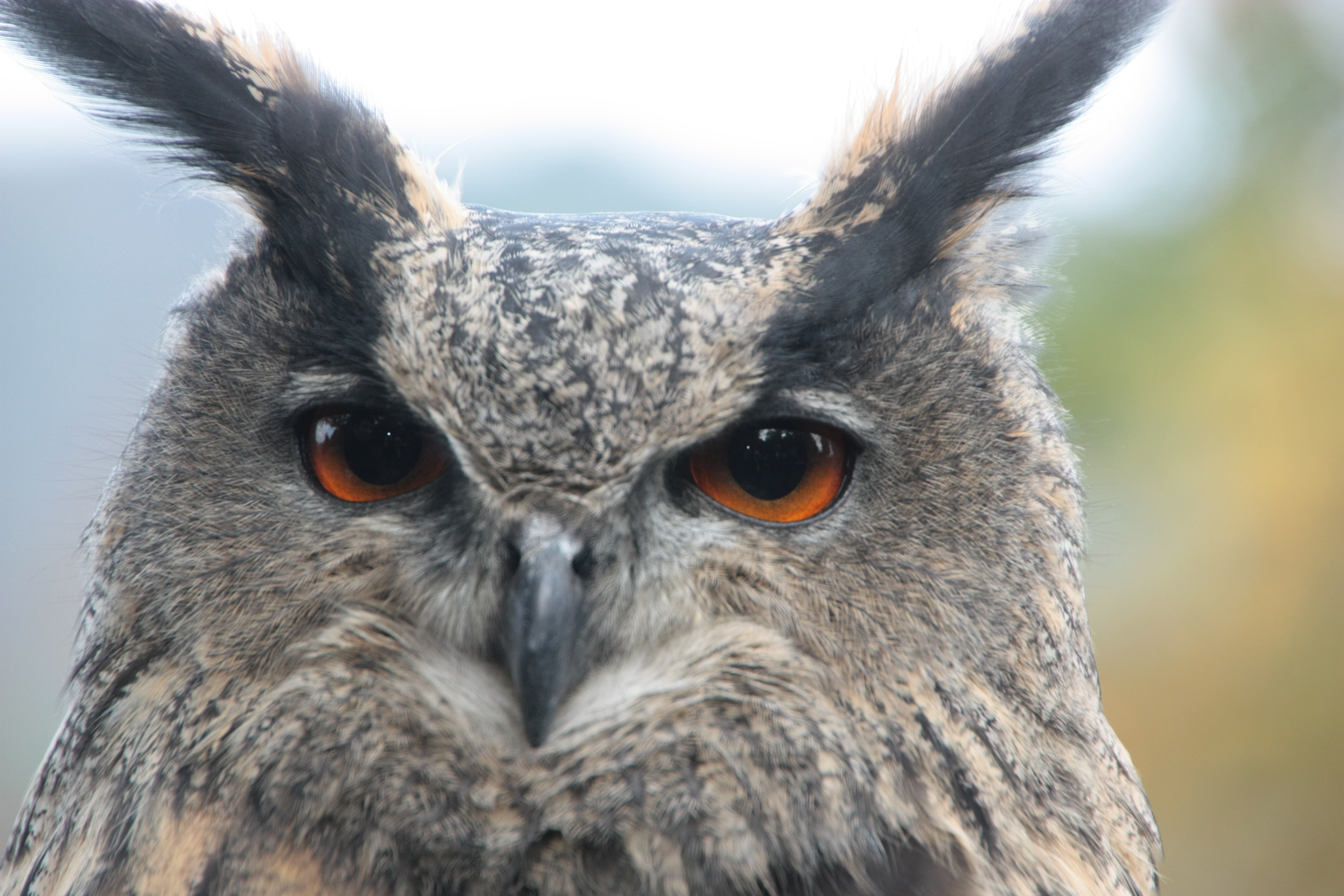 Uhu Wildpark Waldeck